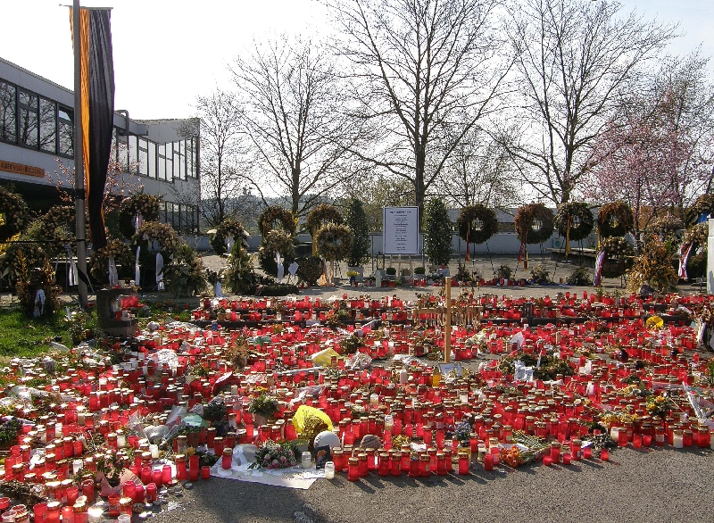 Bilder der Albertville-Realschule aus Winnenden